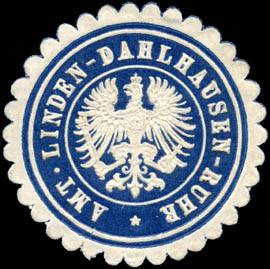 Sealing stamp Title: Amt Linden - Dahlhausen - Ruhr Description: blau, weiß, geprägt Place: size: 4 cm